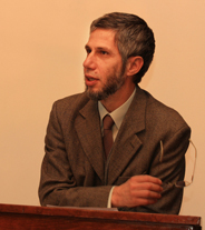 Николай Аретов